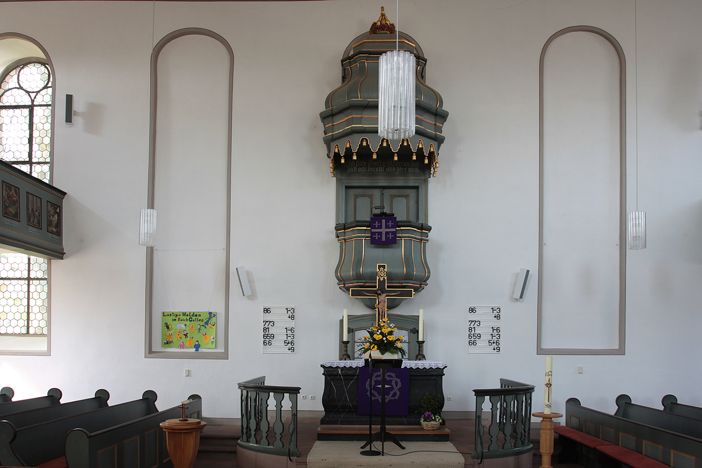 Innenraum der Ev. Kirche Atzbach, Lahnau, Lahn-Dill-Kreis, Hessen, Deutschland